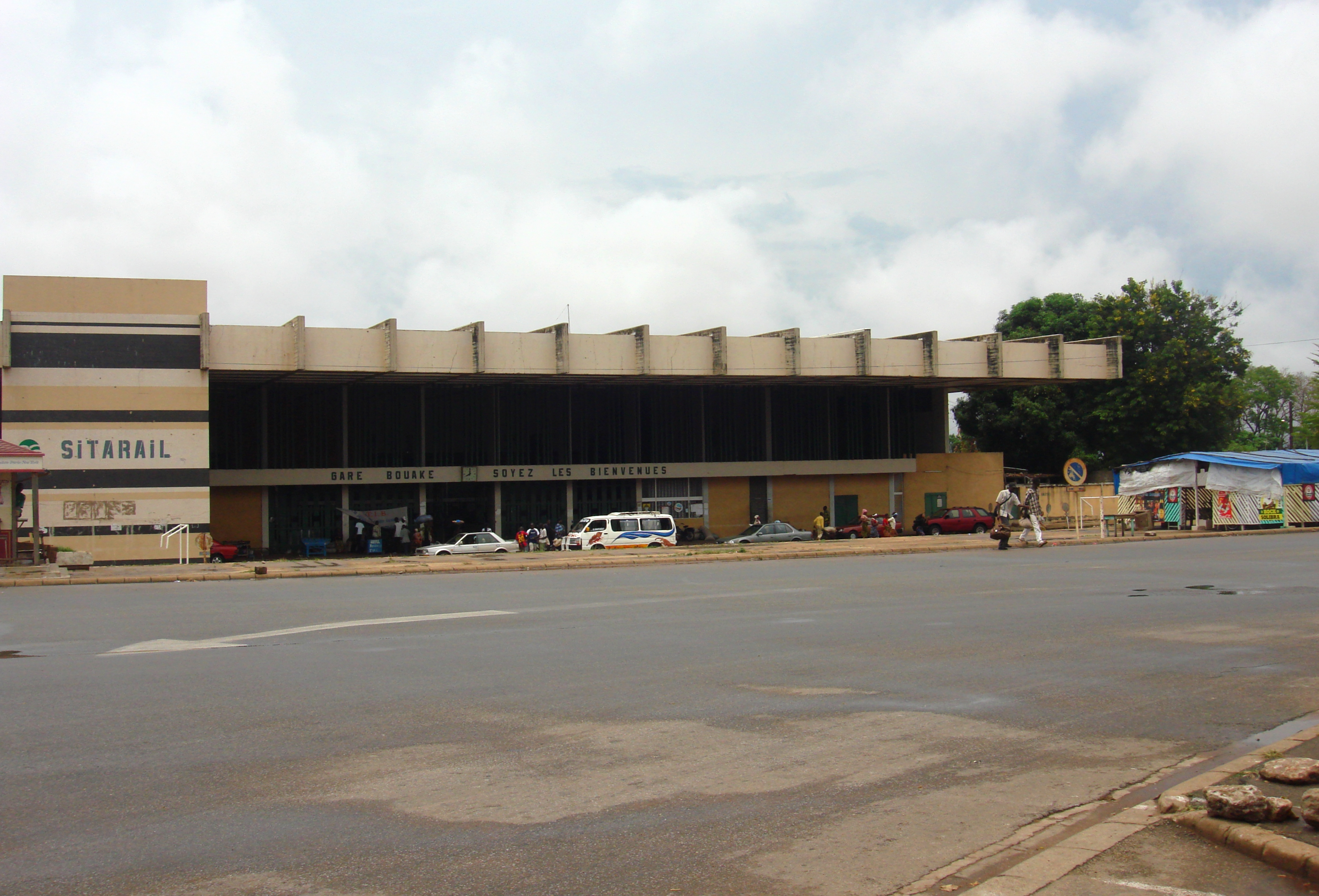 Gare de trains à Bouaké (Côte d'Ivoire)